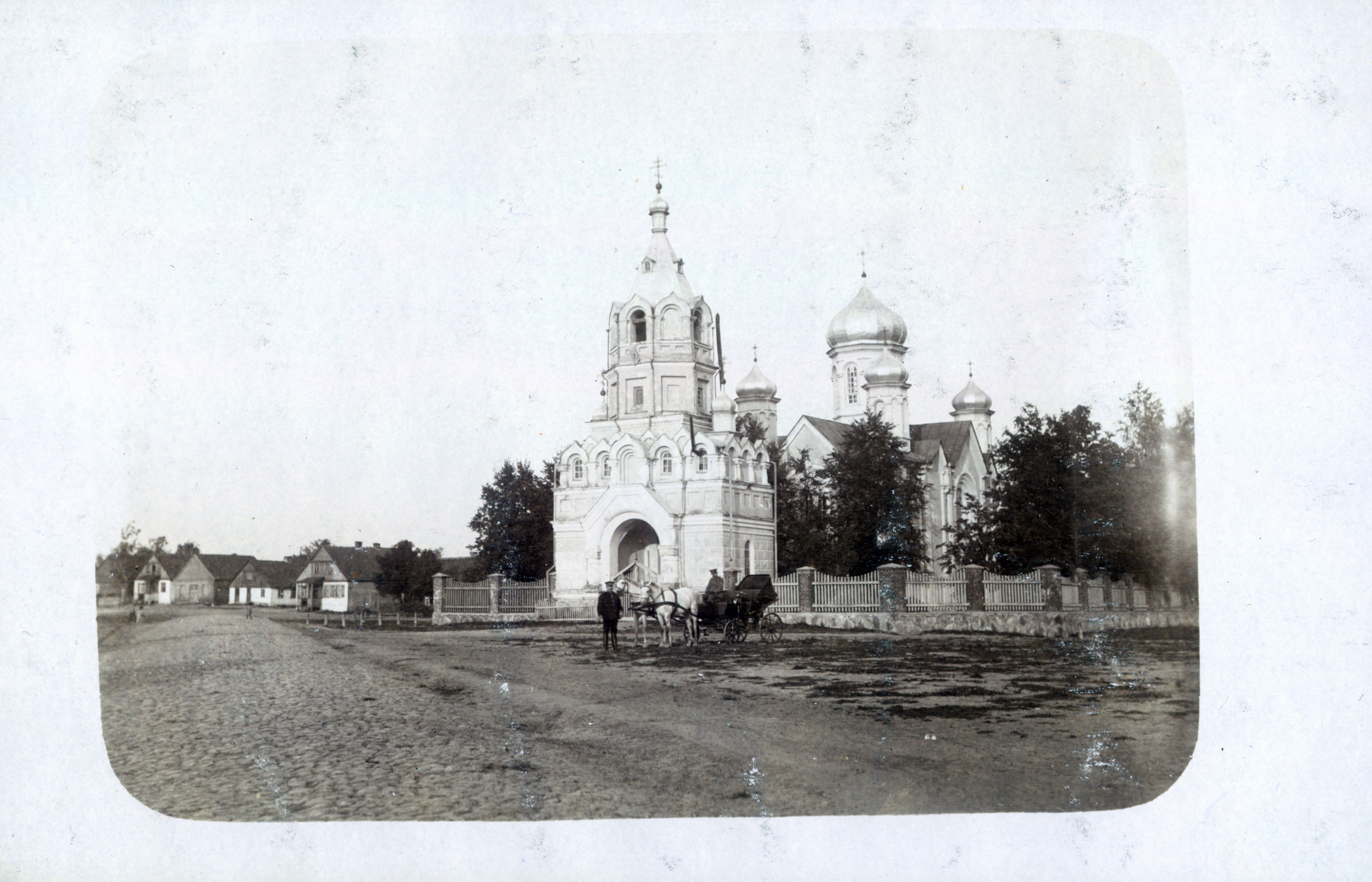 Беларуская (тарашкевіца): Васількаў (Vasilkaŭ), пляц Рынак (plac Rynak). Петрапаўлаўская царква-мураўёўка